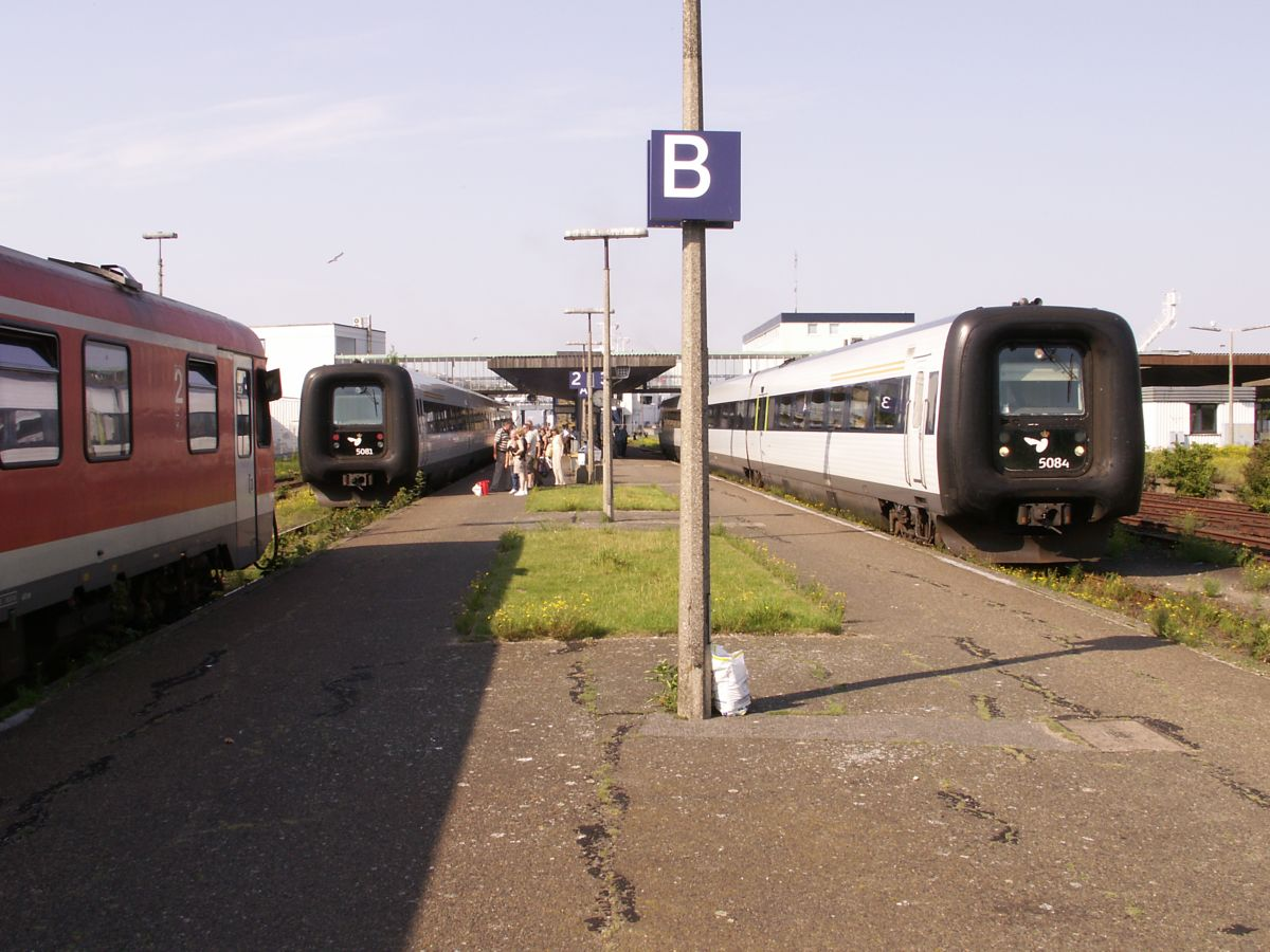 Dänische IC3-Zugteile im Bahnhof Puttgarden. Ein Teil wartet auf Weiterfahrt mit dem Fährschiff, ein Teil verbleibt in Deutschland.